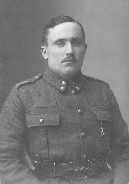 Eduard Kussal